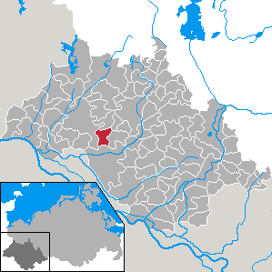 Pritzier in Mecklenburg-Vorpommern - district Ludwigslust